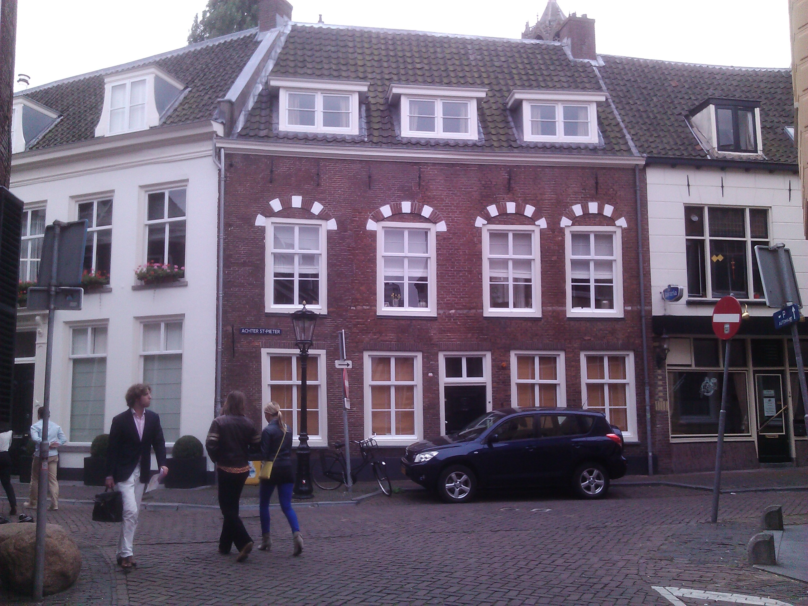 Pand met gevel met rechte kroonlijst Achter Sint Pieter 5, Utrecht, NL 2.4 (Android).